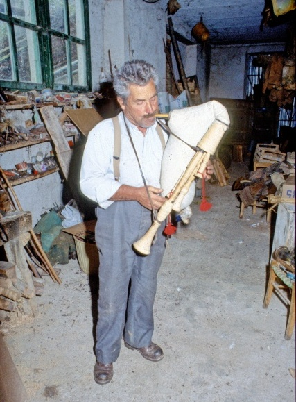 Ausonia (FR), 1981, L'artigiano costruttore di zampogne.